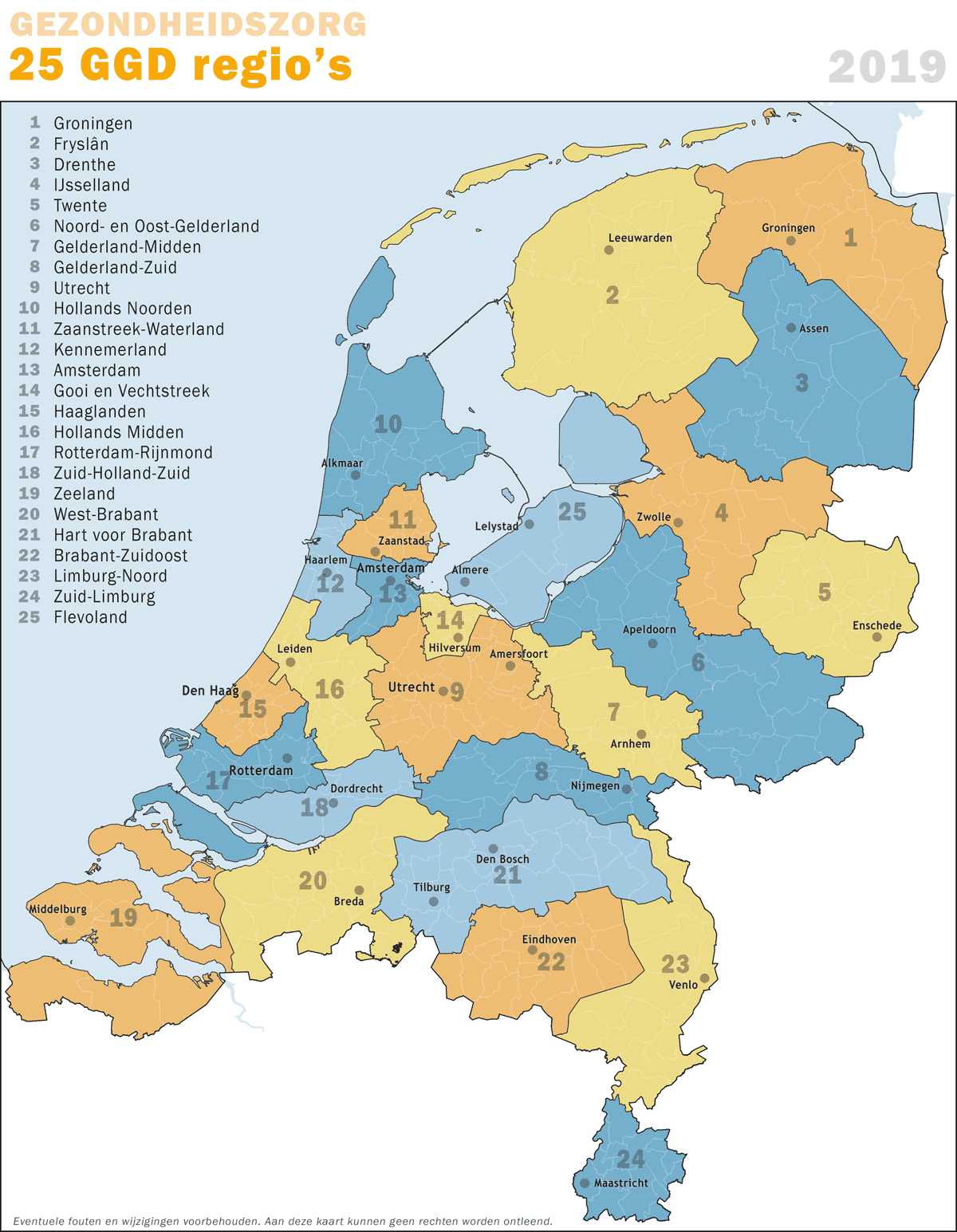 Overzichtskaart van de GGD regio's in Nederland per 2019, samengesteld door Jan-Willem van Aalst uit open geodata.